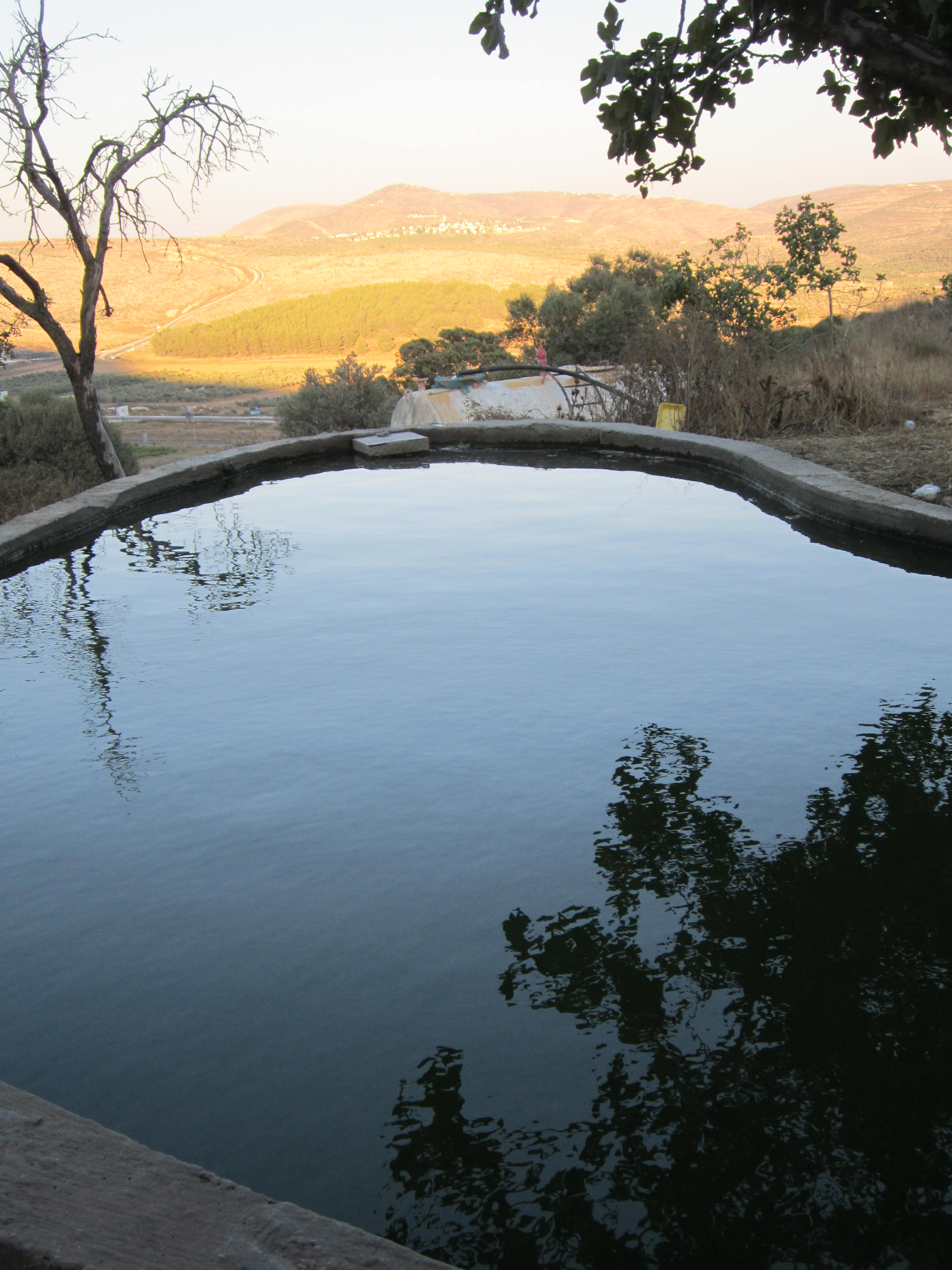 מכונה גם מעיין עמשא